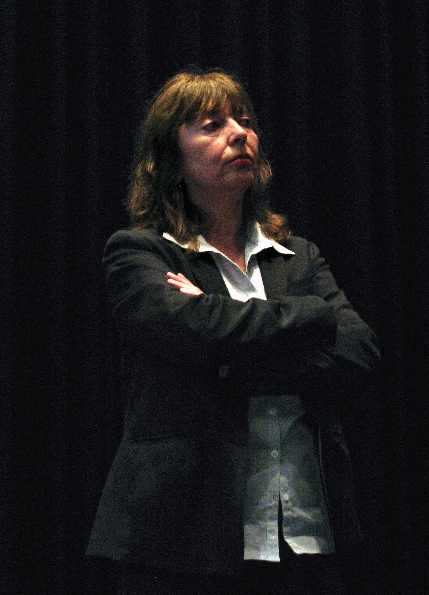 Publikumsgespräch mit Helke Misselwitz zu ihrem Film „Sperrmüll“ im Zeughauskino Berlin, 30.05.2009.